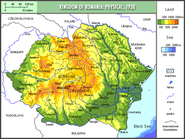 Romania 1939, physical/Mapa fizyczna Rumunii, 1939